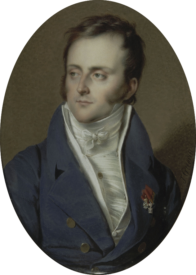 Général_Charles_Huchet_de_La_Bédoyère